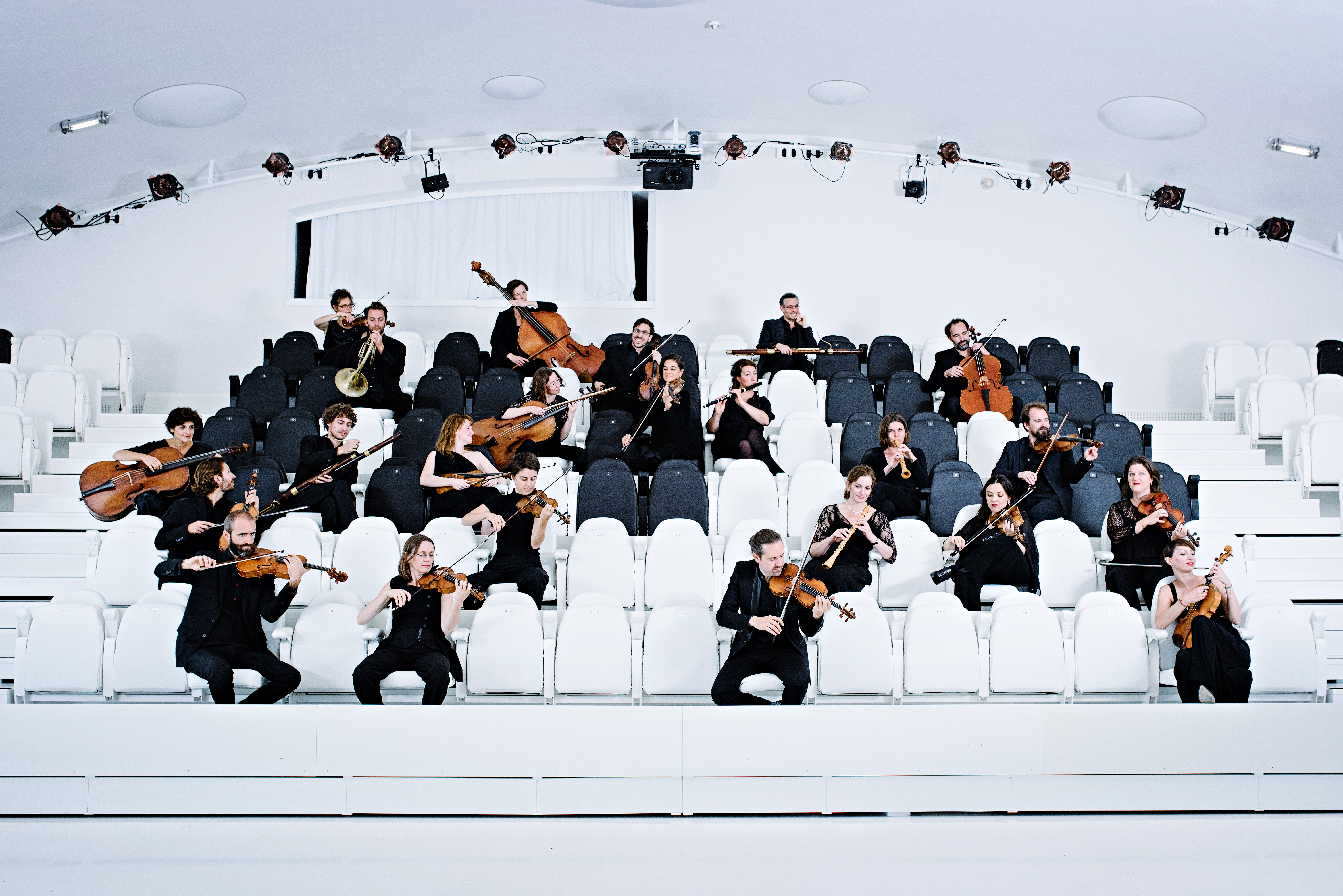 Le Concert de la Loge ©Franck Juery